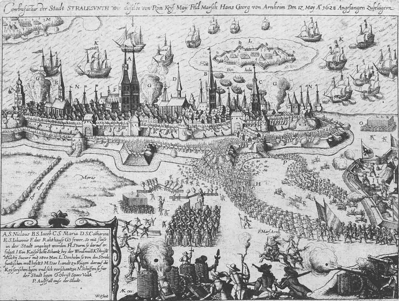 Belagerung Stralsunds durch Wallenstein 1628, Kupferstich auf einem zeitgenössischen Flugblatt